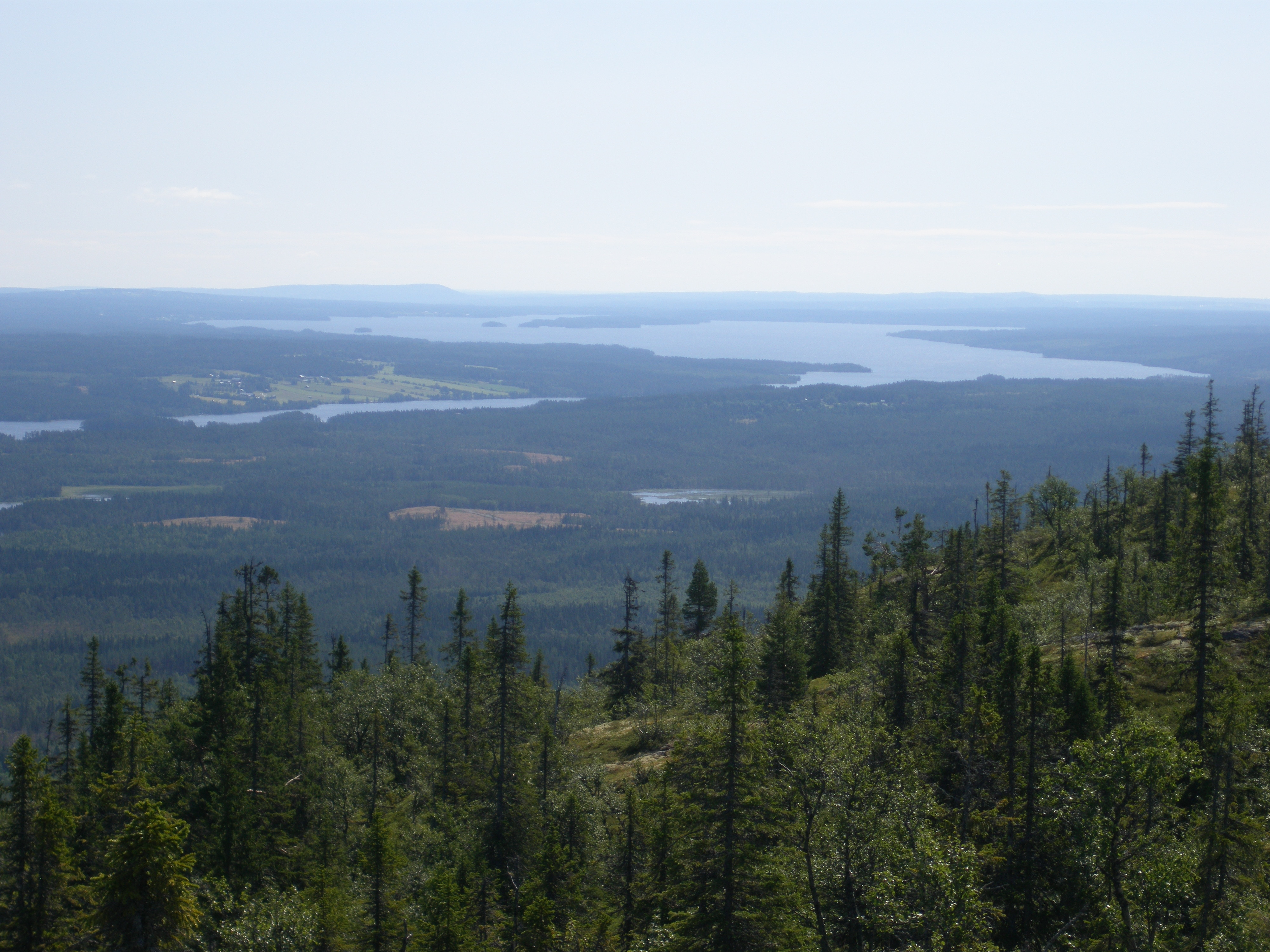 Utsikt från Hällberget i Offerdal mot Näldsjön, Krokoms kommun, Jämtland, Sverige.